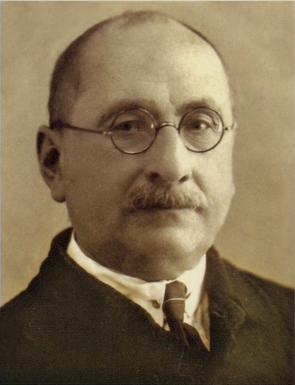 სოლომონ ქურდიანი